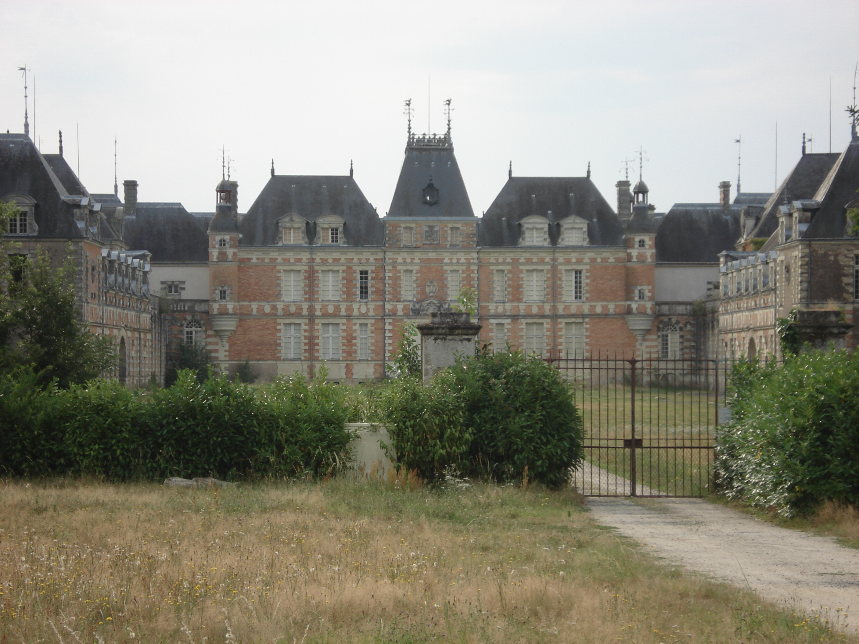 Chateau Clermont, de laatste woonplaats van Louis de Funes